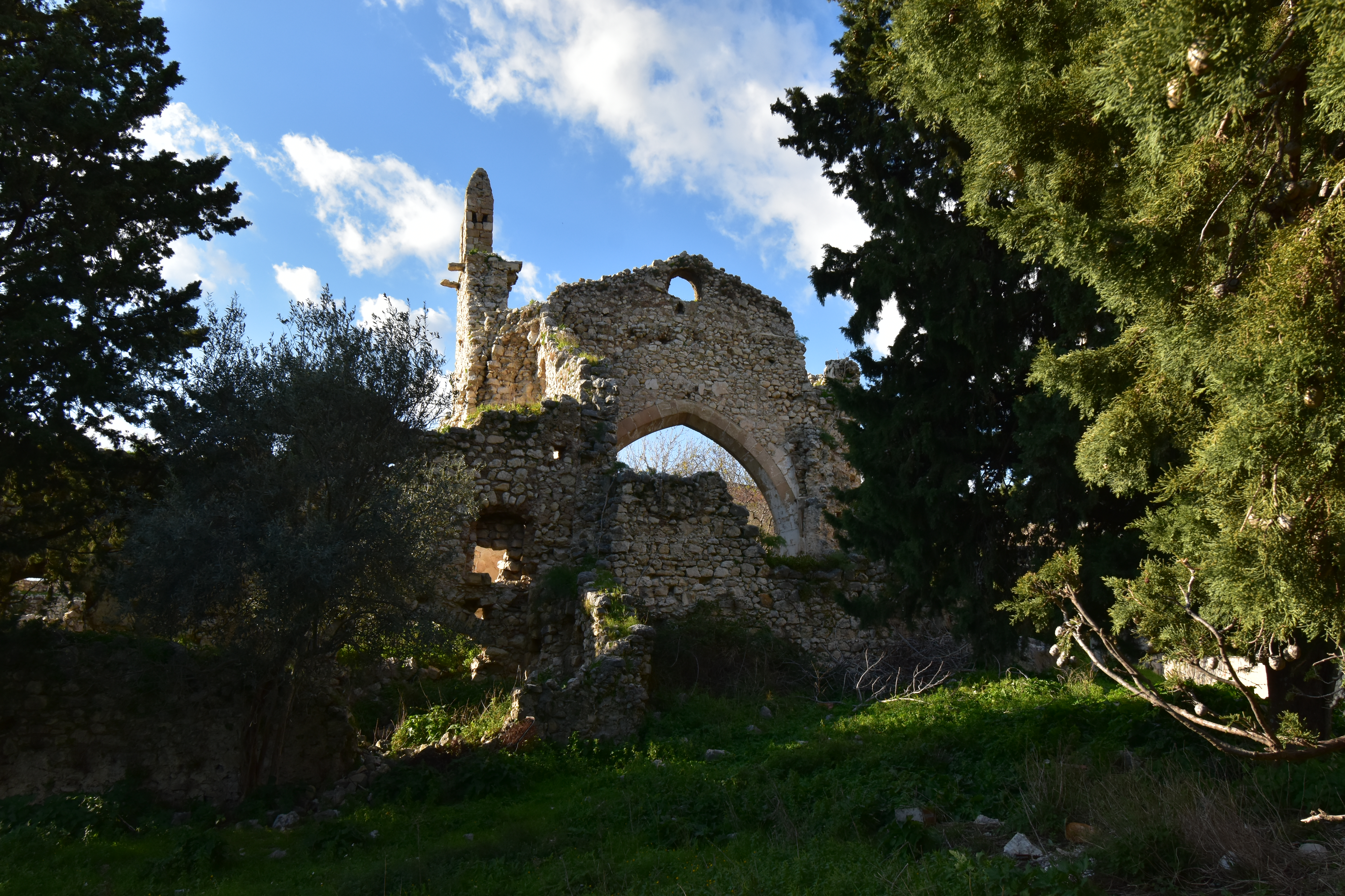 Bivona - Santa Maria di Gesu